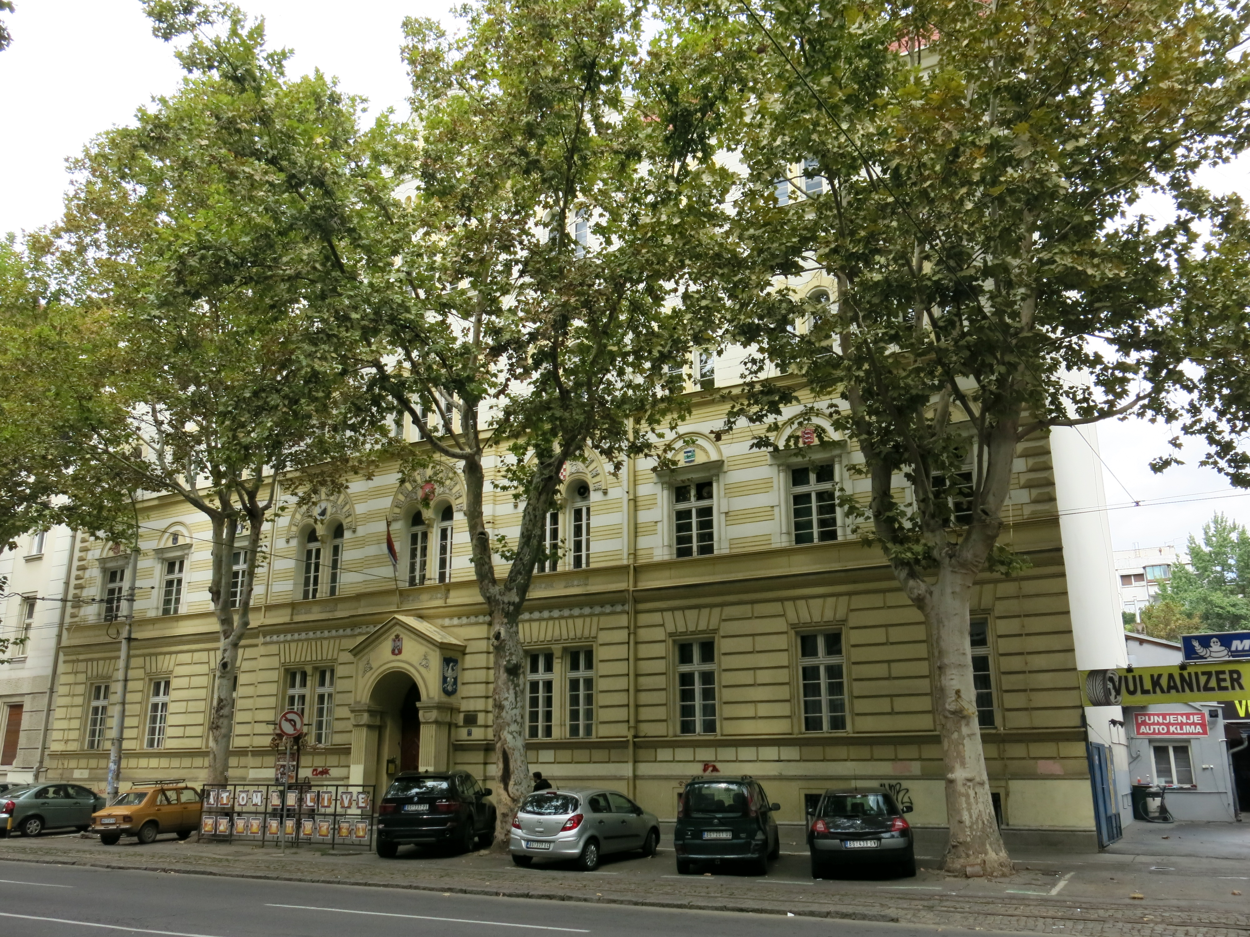 Дом Св. Саве